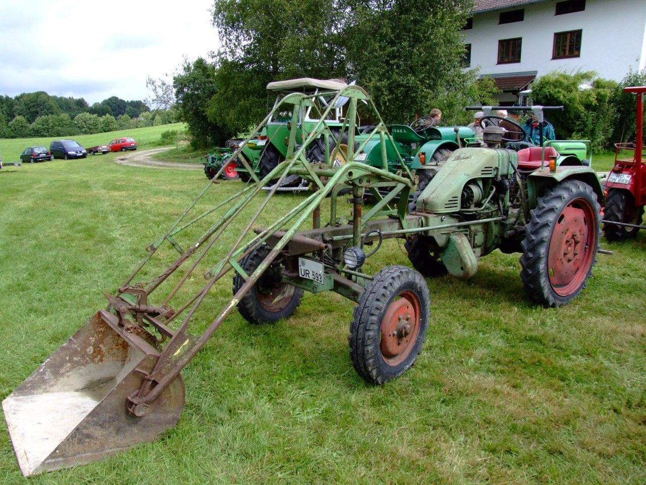 Fendt-Geräteträger F12GT mit 12 PS, Baujahr 1958, zul. Gesamtgewicht: 2500 kg, zul. Achslast vorne: 900 kg, zul. Achslast hinten: 1600 kg